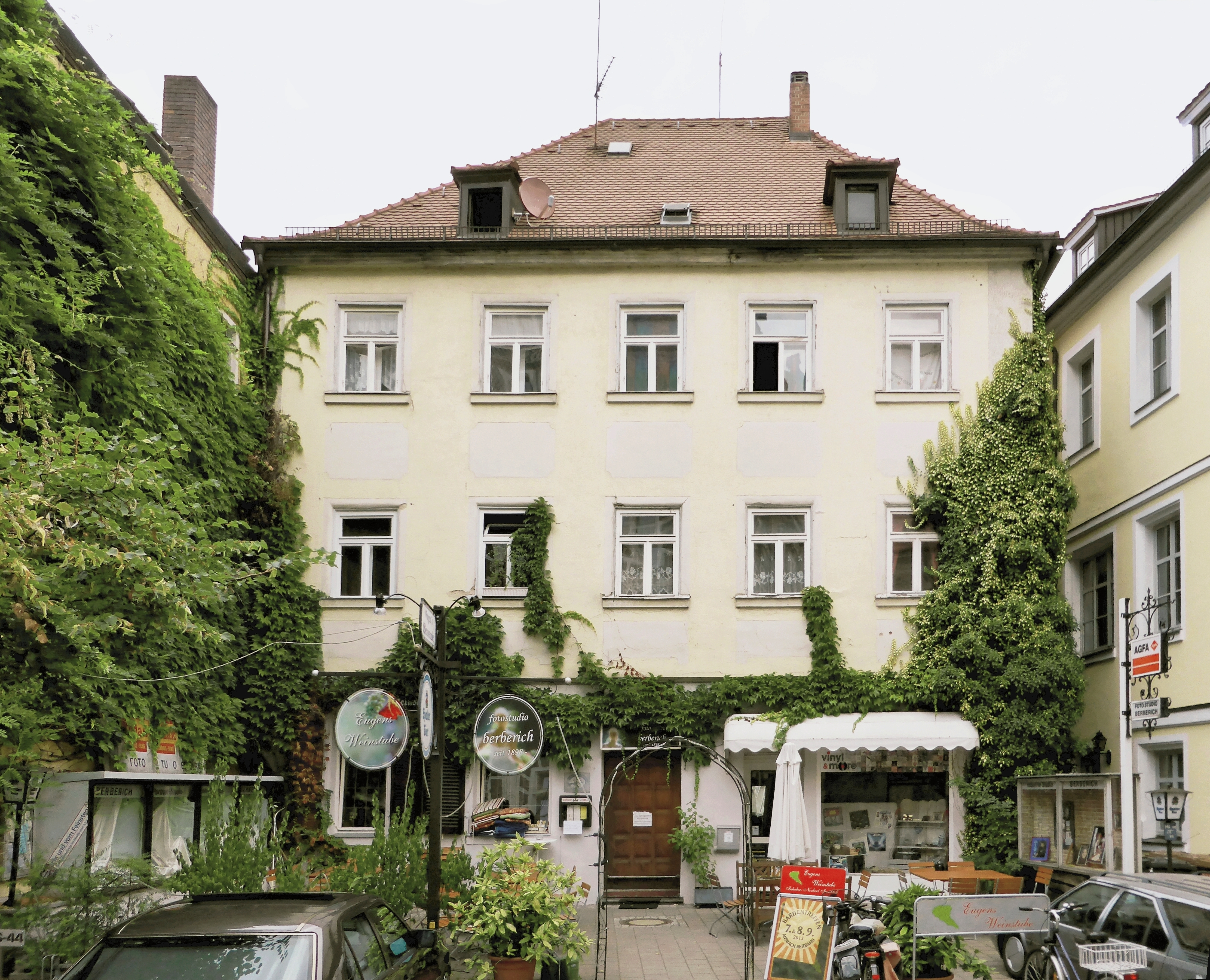 Germany, Bayern, Ansbach, Pfarrstraße 35